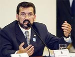 Depoimento na CPI do Dr. Joel Santos Filho, denunciante do esquema dos Correios